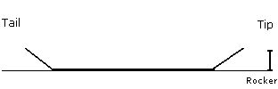 Schematische Darstellung eines Wakeboards mit 3-Stage-Rocker-Shape